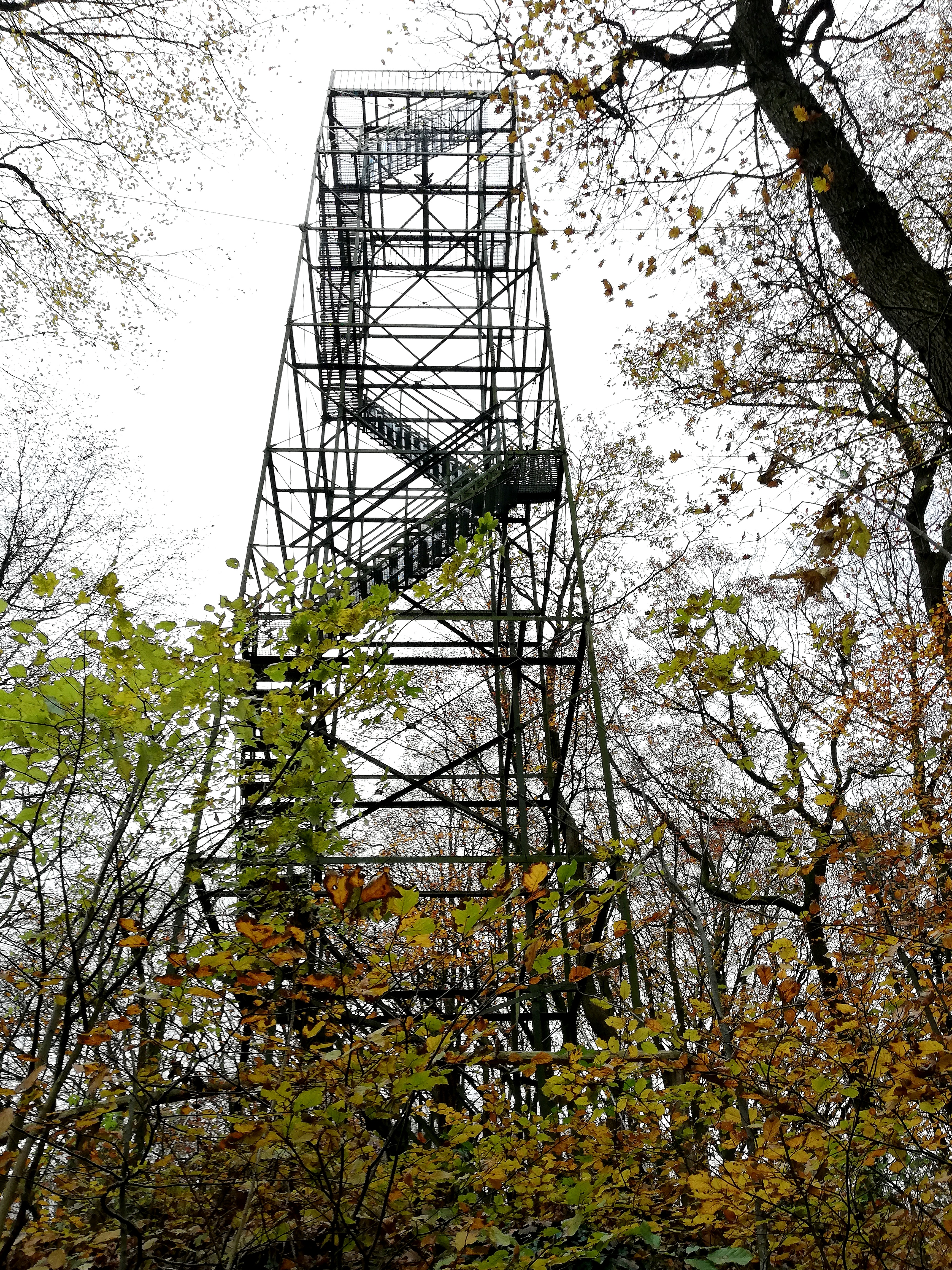 Aussichtsturm auf dem Kaiserberg in Albersdorf